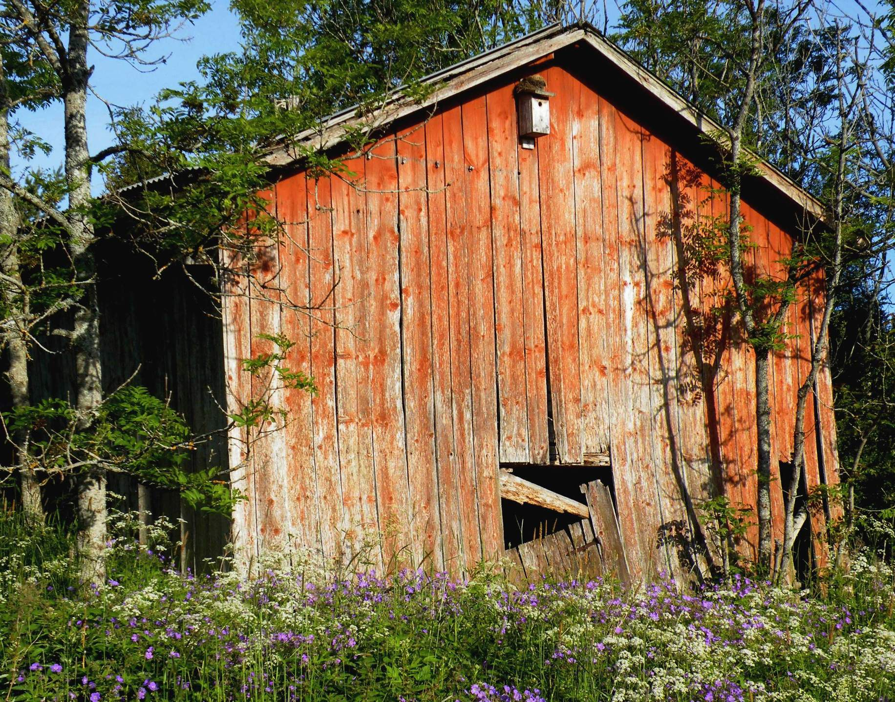 Tässä on oivallettu miten linnunpönttö voi myös ripustaa ulkorakennukseen, Brändö